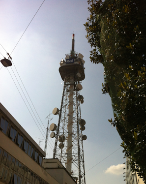 Antenna Rai di Corso Sempione (Milano) con la nuova insegna